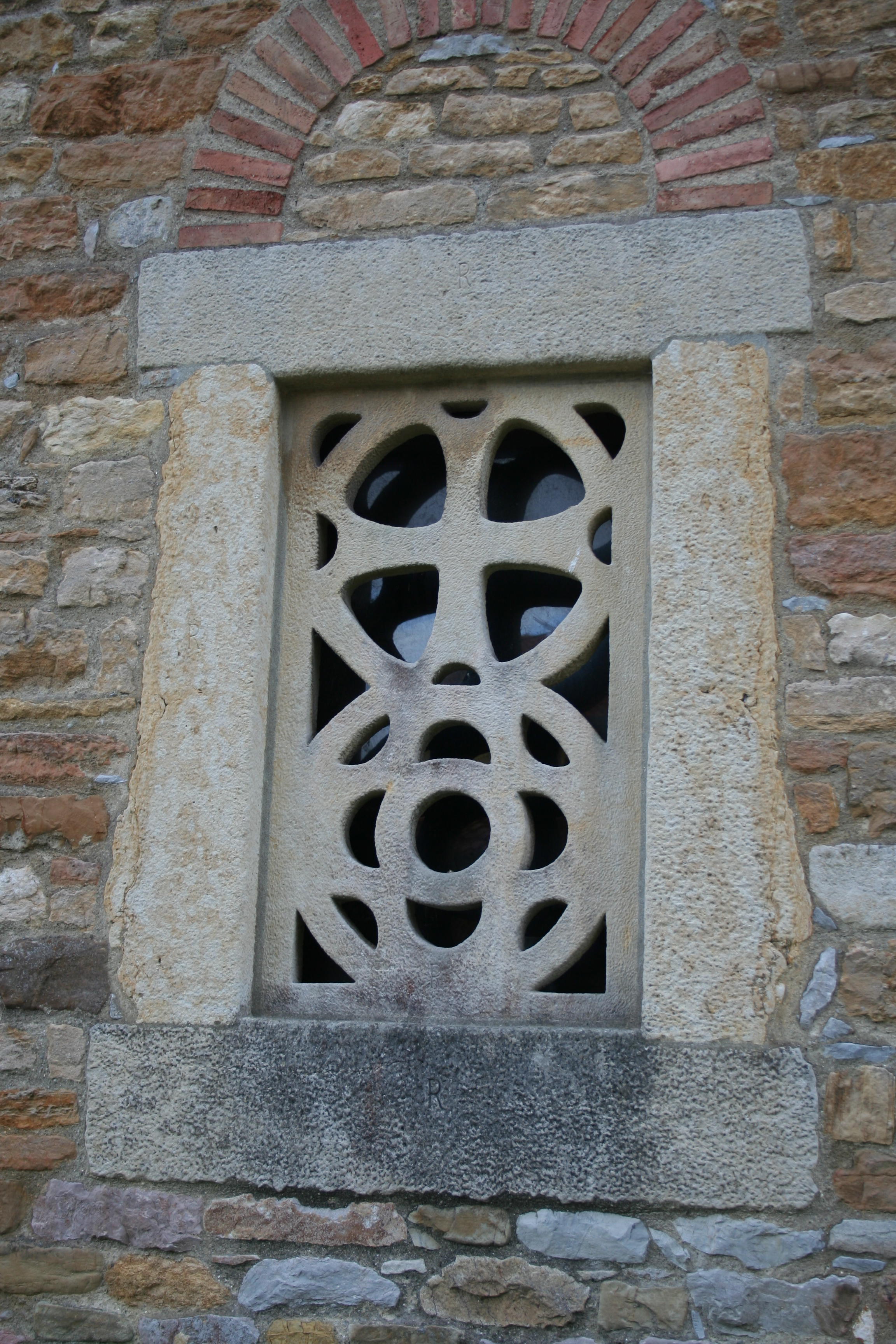 Santa María de Bendones detalle Ventana